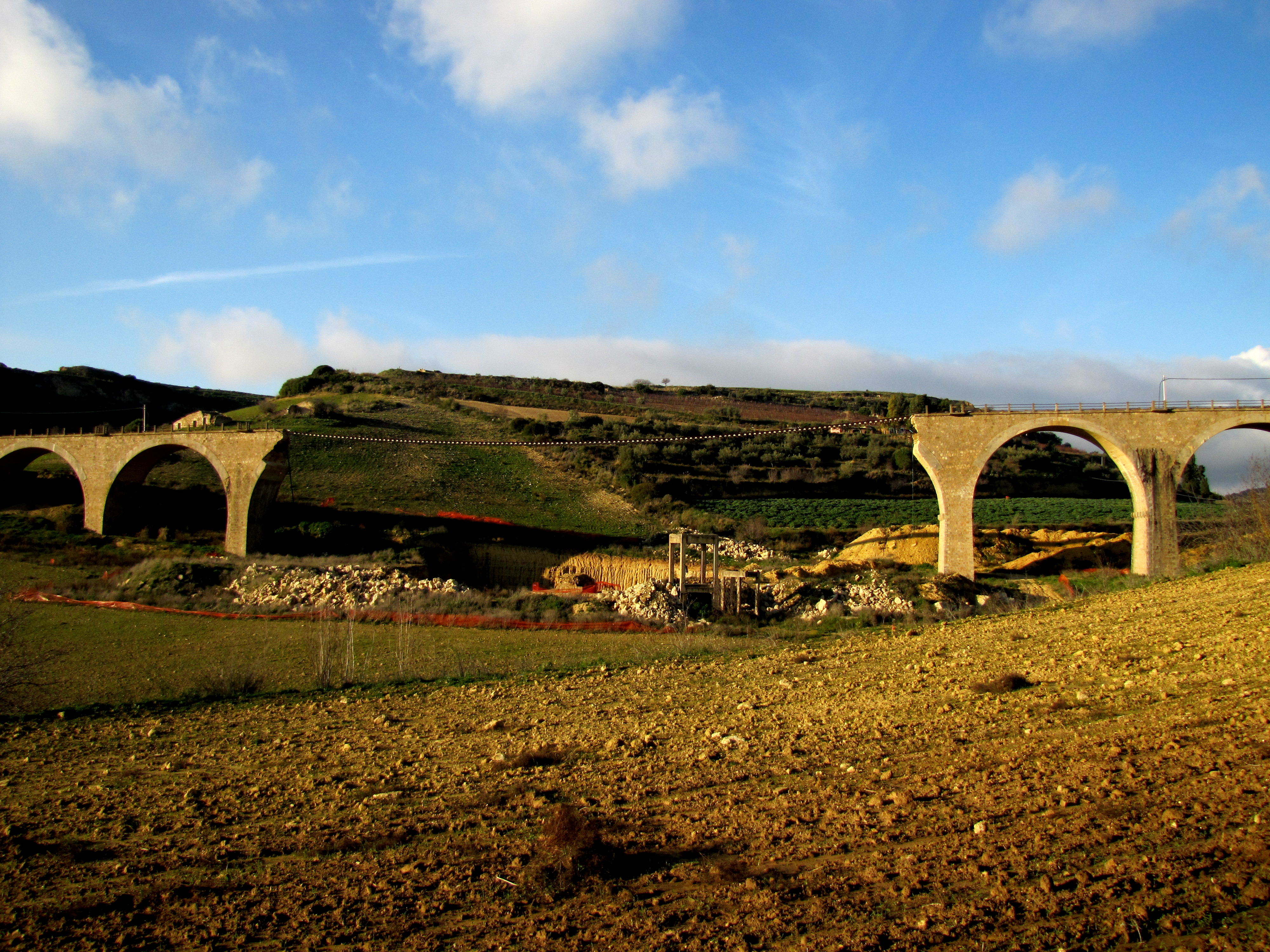 Ponte crollato nel tratto di ferrovia Niscemi-Caltagirone